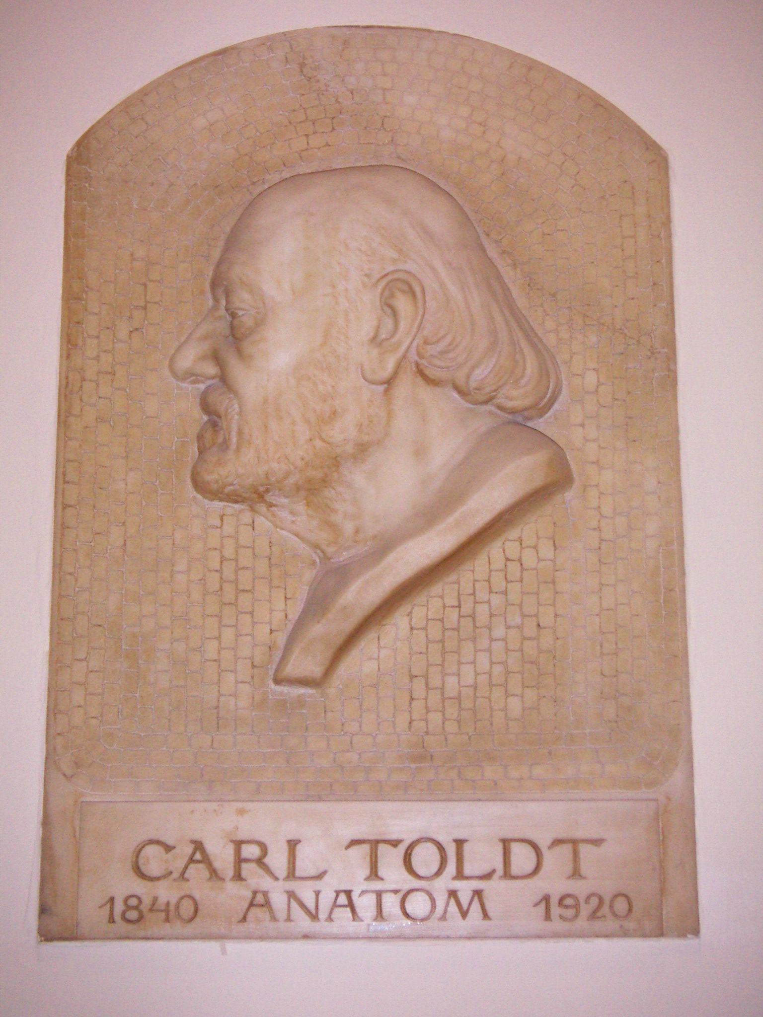 Seitenportrait von Carl Toldt 1840 - 1920, situiert im Stiegenhaus des Anatomischen Institutes der Universität Wien in der Währinger Straße